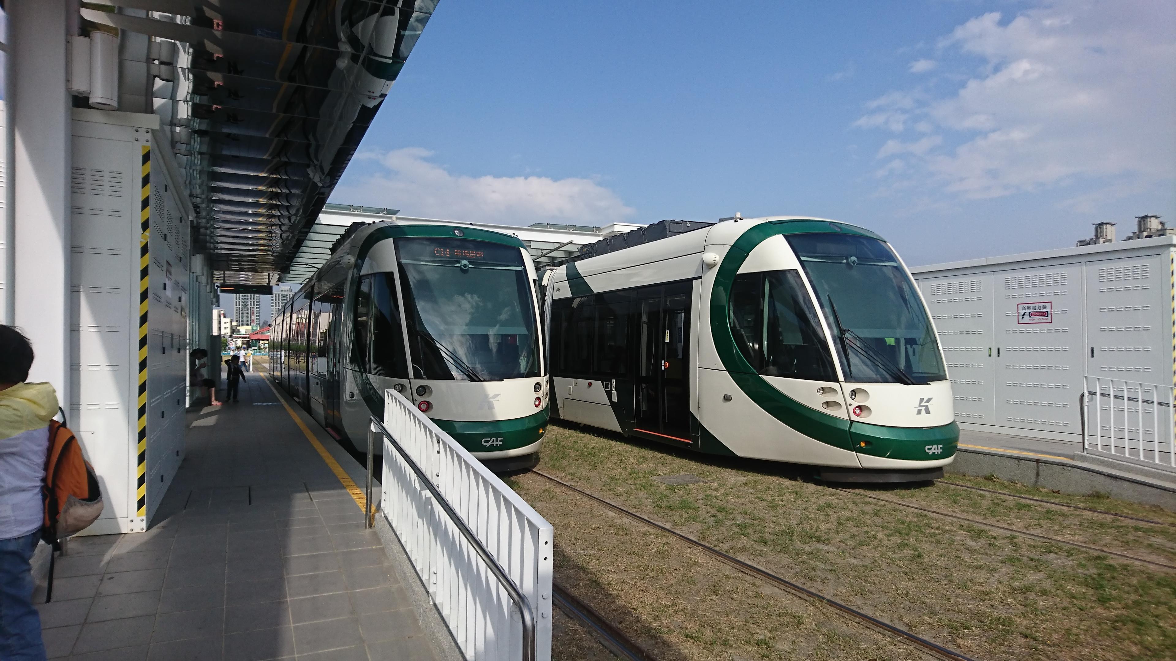 輕軌車箱並行與車站照片